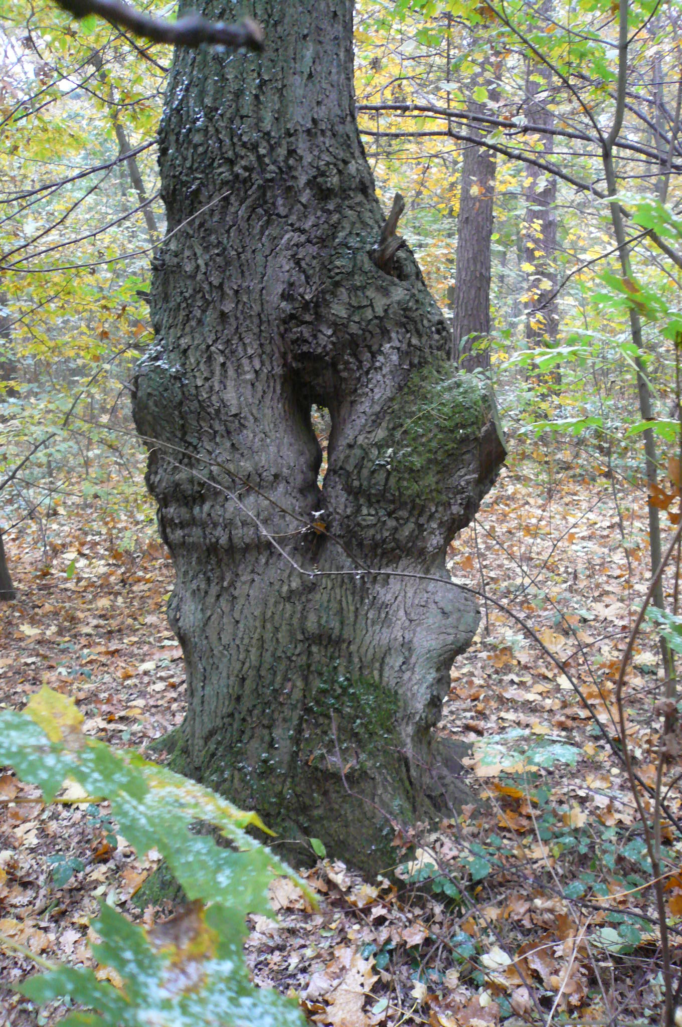 Dąb w Lesie Bemowskim, zwany Babcia w Ciepłych Majtkach